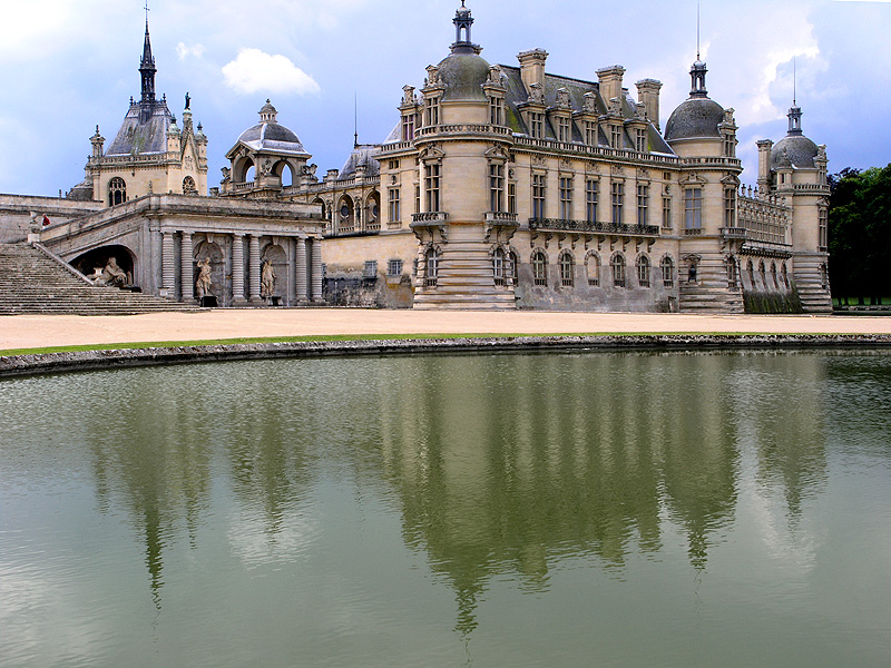 Chateau de Chantilly à 40 km au nord de Paris